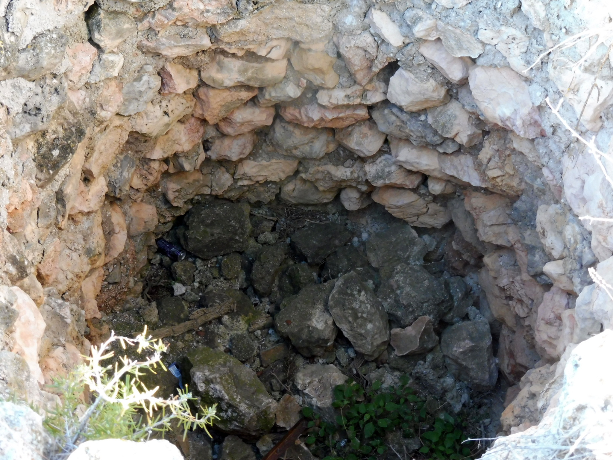 Castell de Campvim (les Avellanes i Santa Linya): interior de la torre